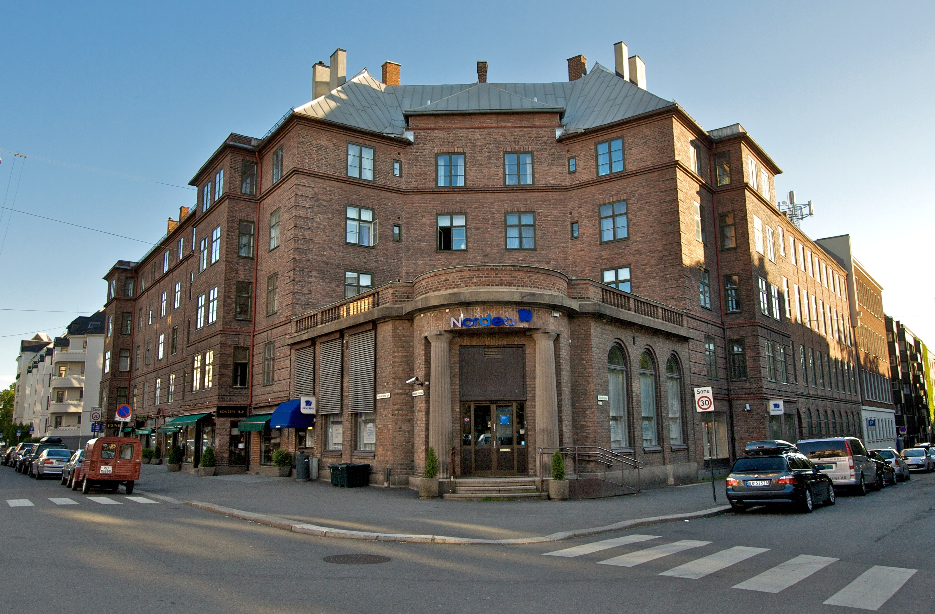 Nordea - Frognerveien 36, Frogner i Oslo. Arkitekter: Ekman, Smith & Michalsen (1920).